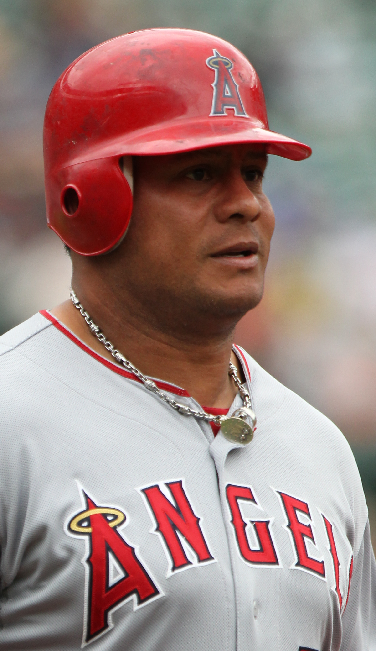 Bobby Abreu. Angels at Orioles September 18, 2011